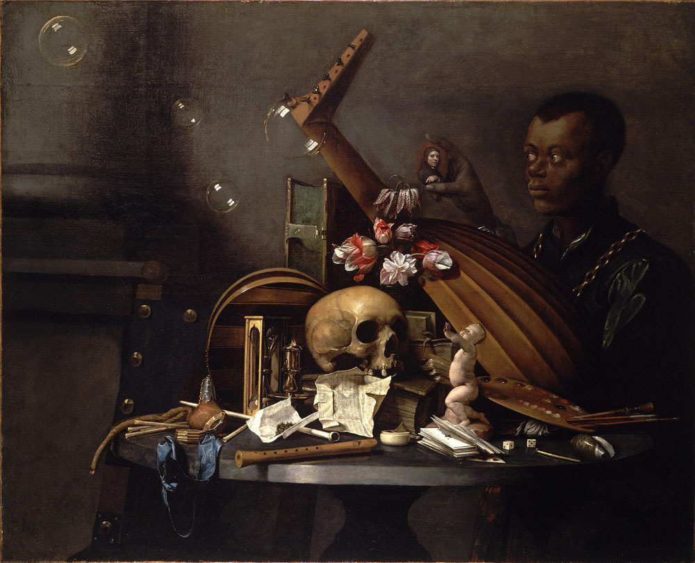 Vanitas